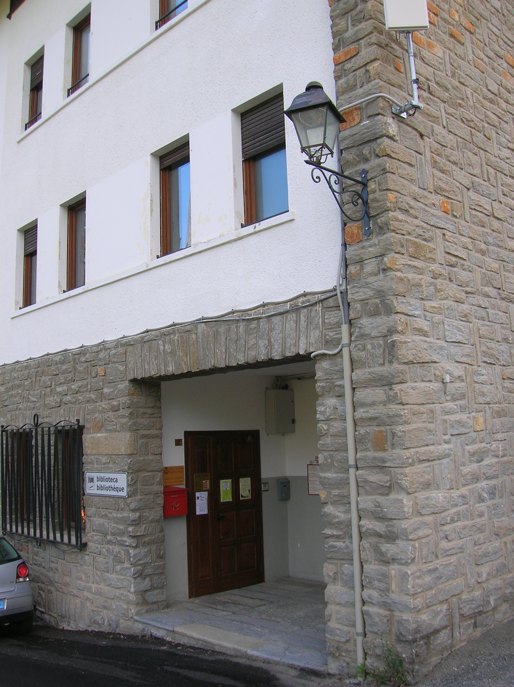 Biblioteca di Gignod, nell'ex palazzo delle Associazioni. Gignod, Valle d'Aosta, Italia.